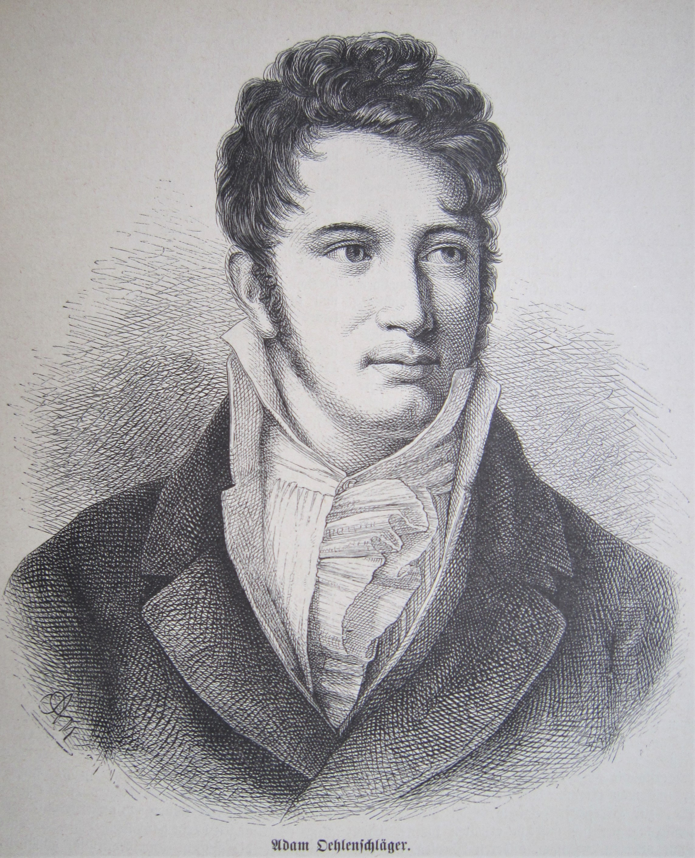 Bildnis Adam Oehlenschläger, auf Holz gezeichnet von Adolf Neumann nach Porträt von Riepenhausen